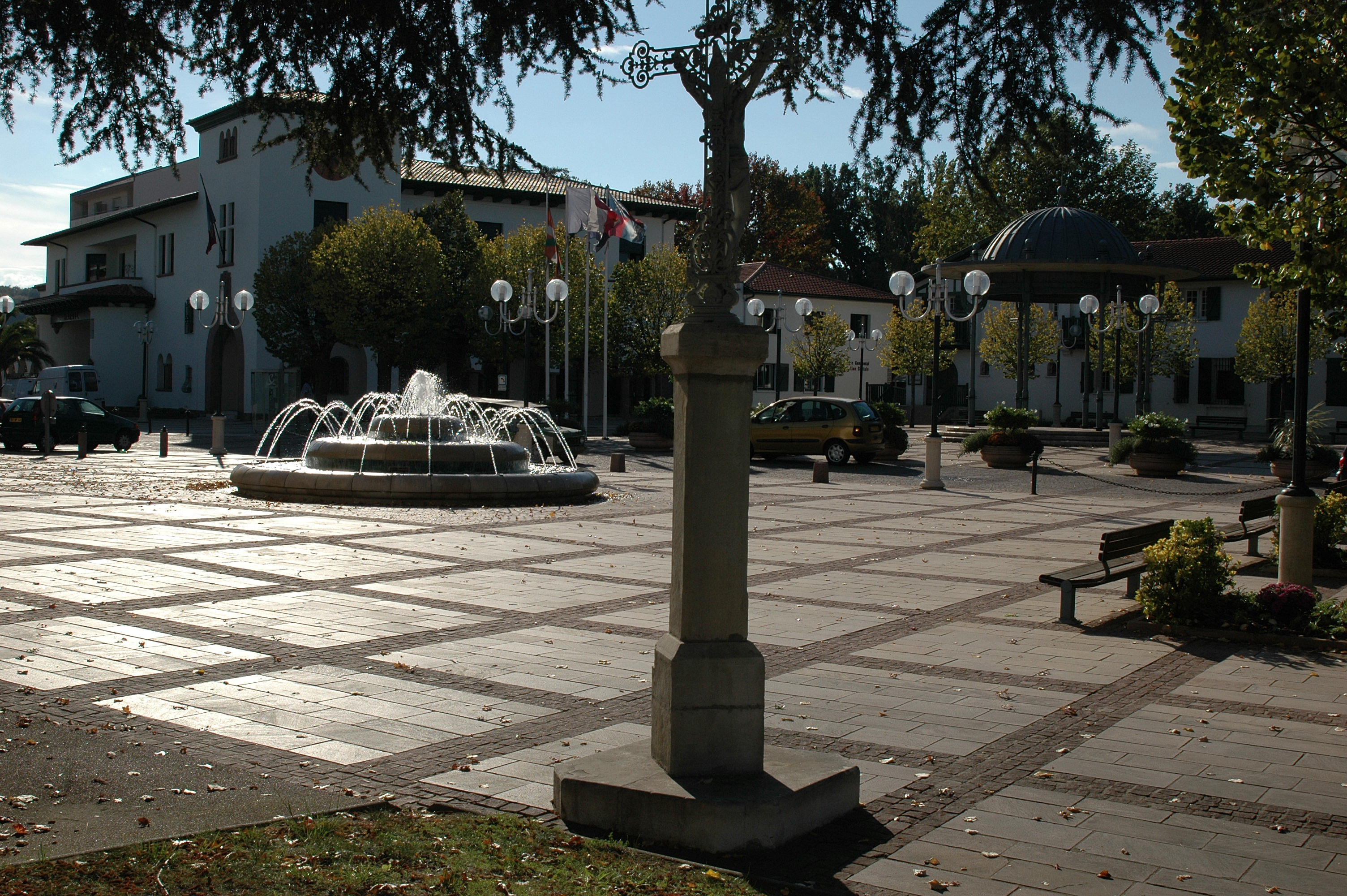 Anglet, la mairie et la fontaine